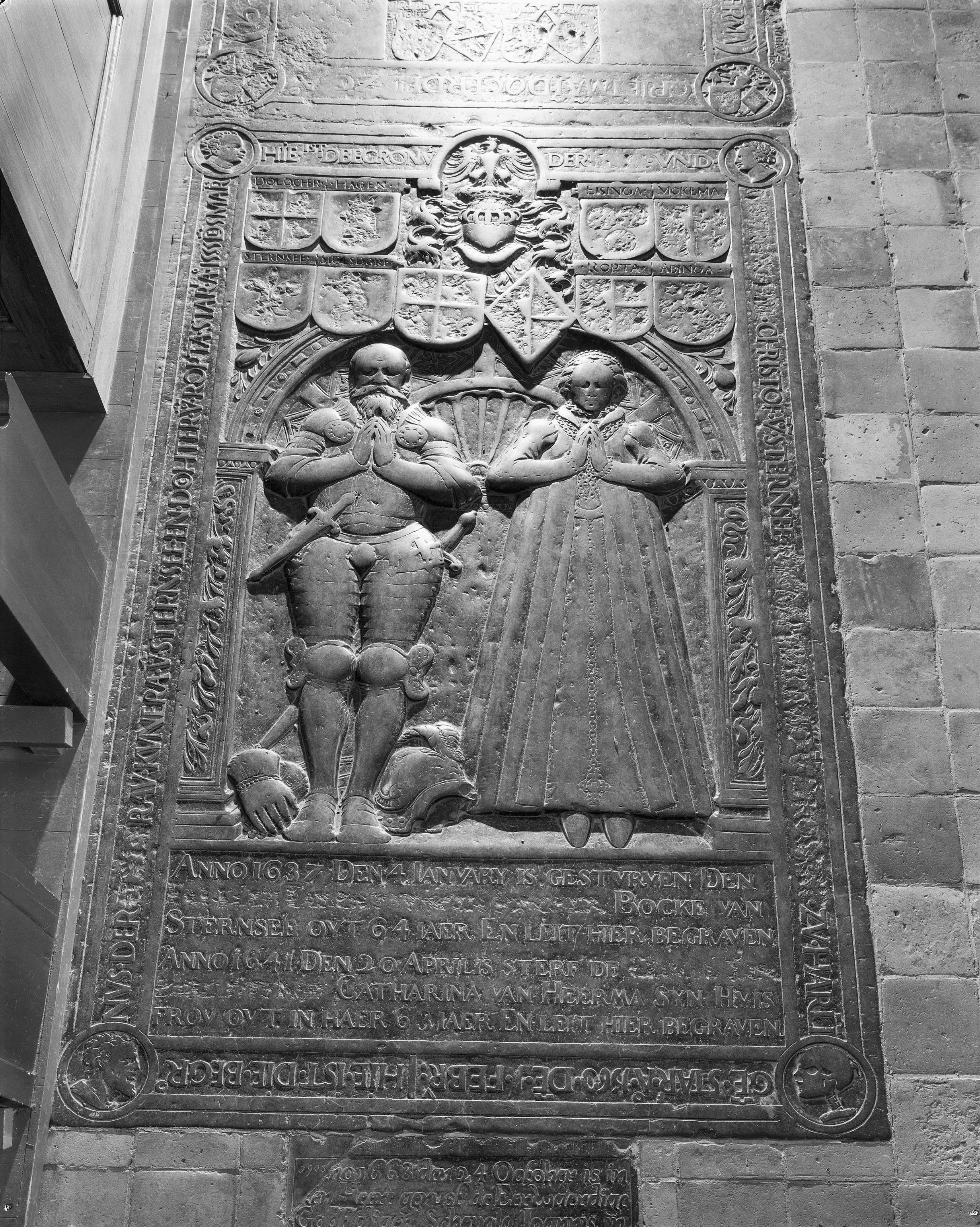 Nederlands Hervormde Kerk: grafzerk